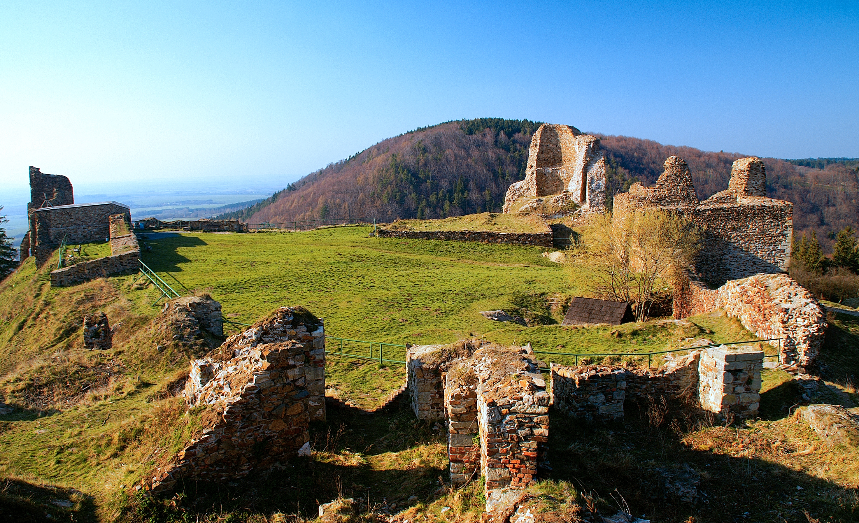 Zbytky hradu Lichnice.